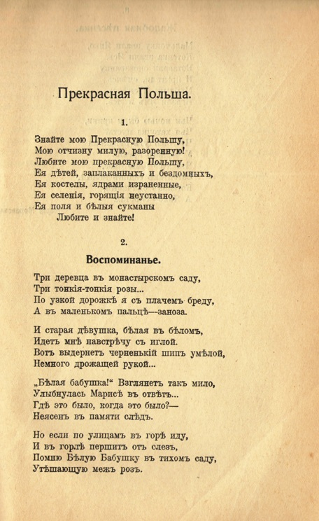 Стихи Марии Моравской в журнале "Русская мысль"